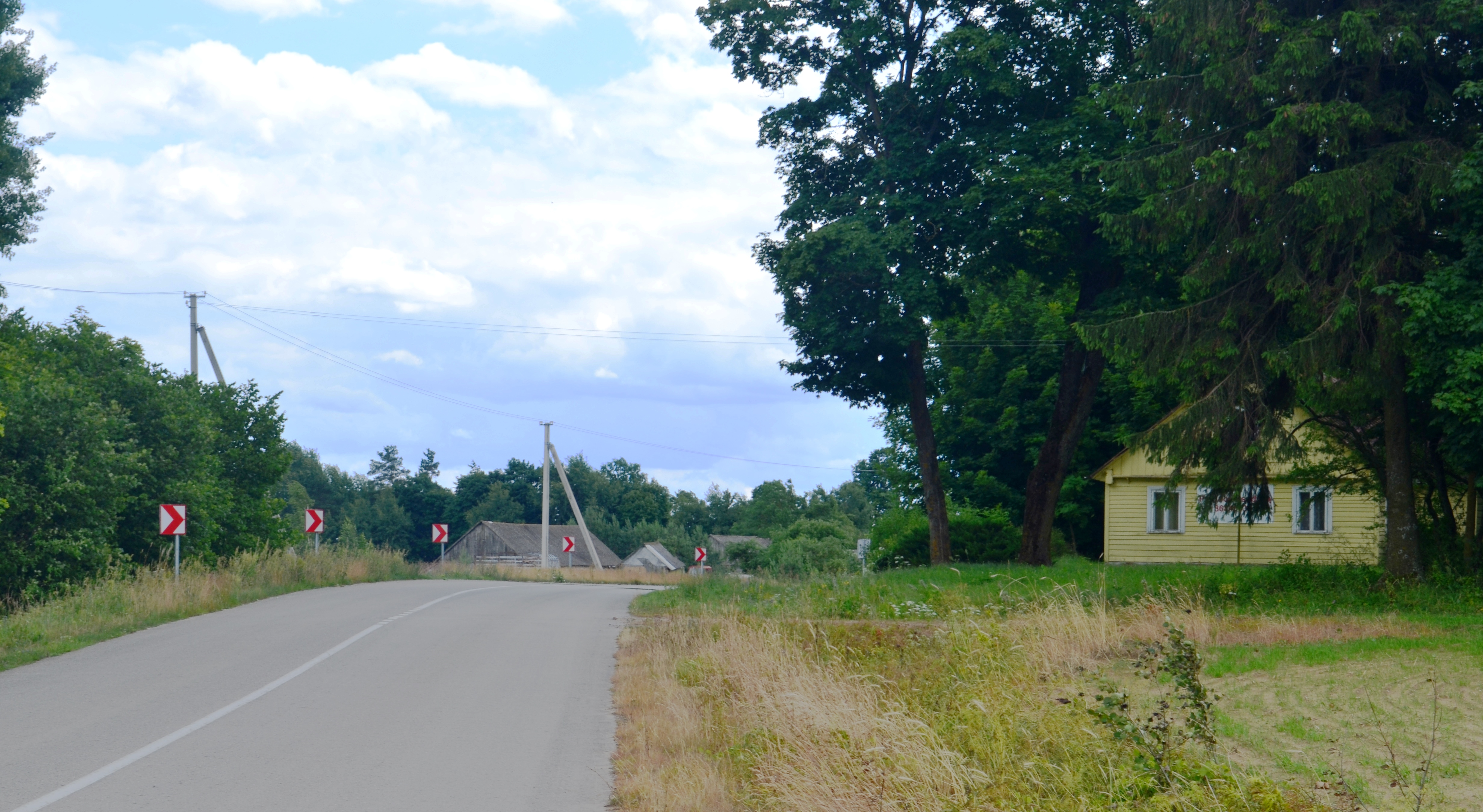 Buckūnai, Lazdijų raj.